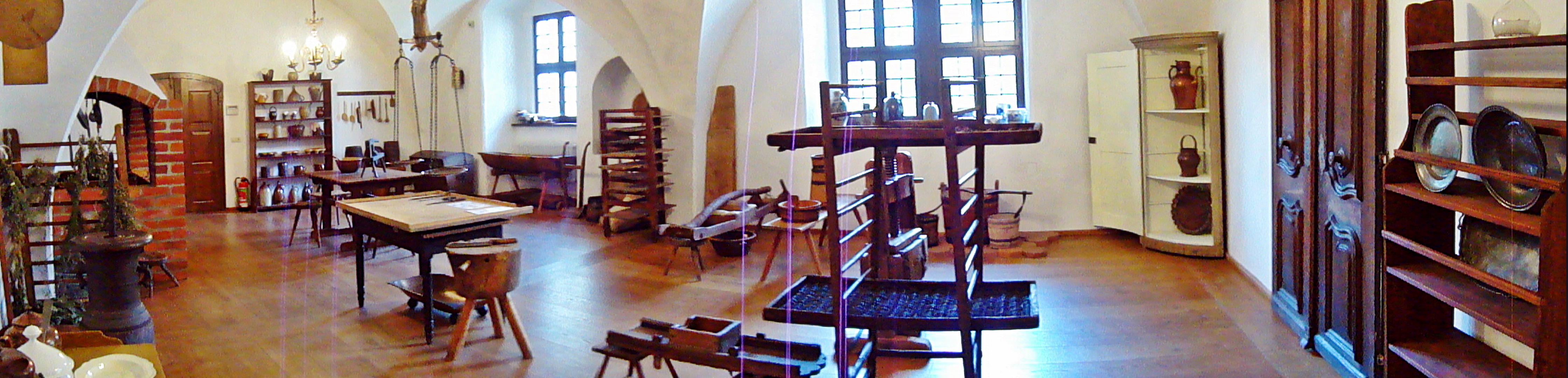 Schlossküche (Schloss Delitzsch)